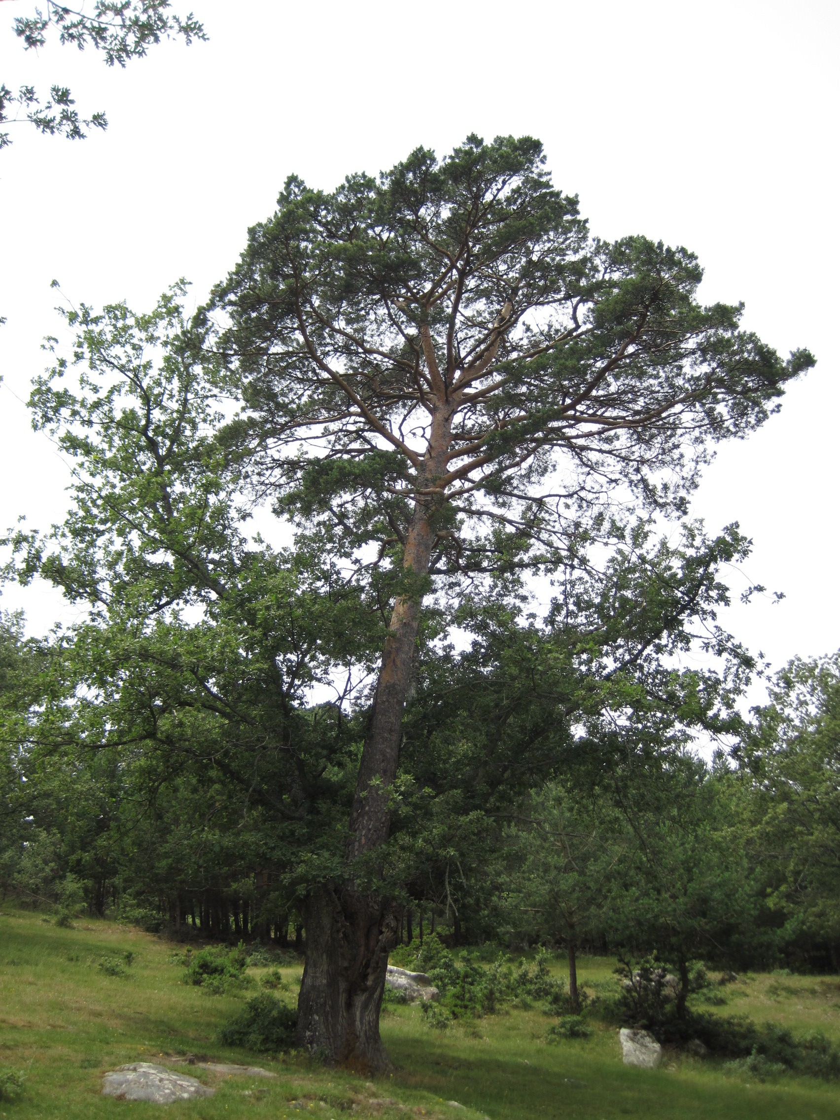 Vista del pino-roble de Canicosa de la Sierra (Burgos, España).